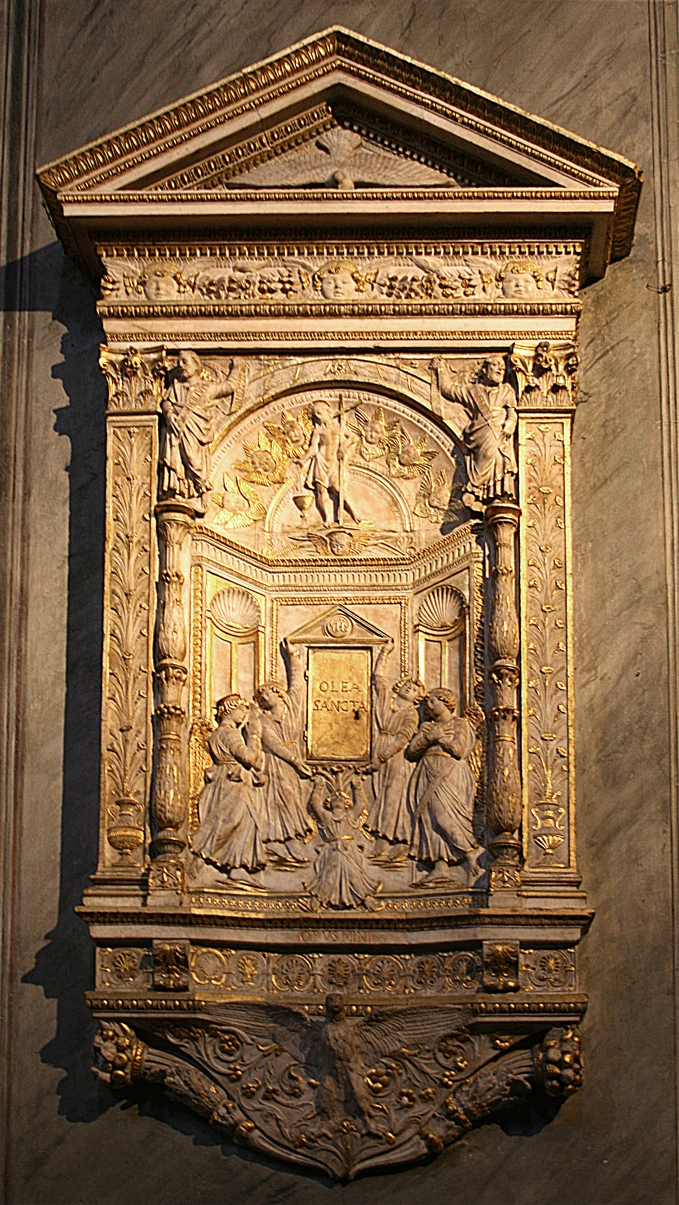 Tabernacle en marbre de « L’Oleo Sancta », œuvre réalisée au XVe siècle par le sculpteur Mino da Fiesole pour la Basilica Santa Maria in Trastevere à Rome (Italie).